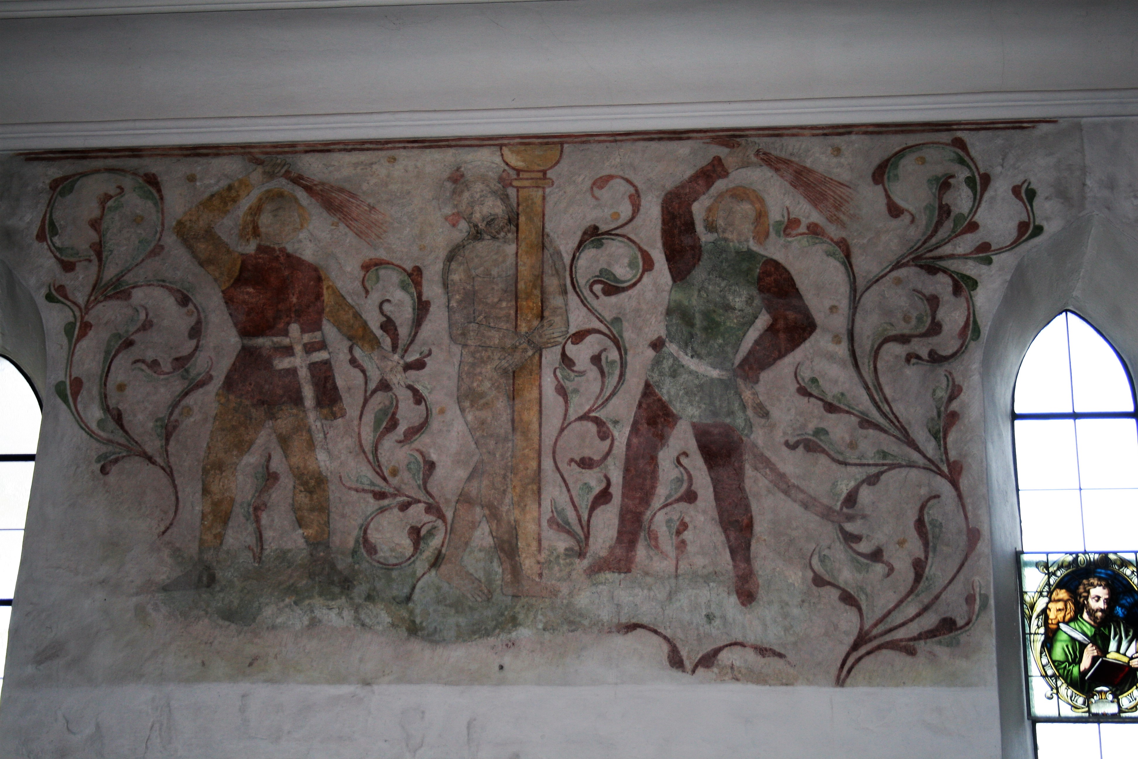 Mittelalterliches Fresko mit der Abbildung des Geißelung Christi in der Georg-und-Mauritius-Kirche in Flemhude (Schleswig-Holstein)